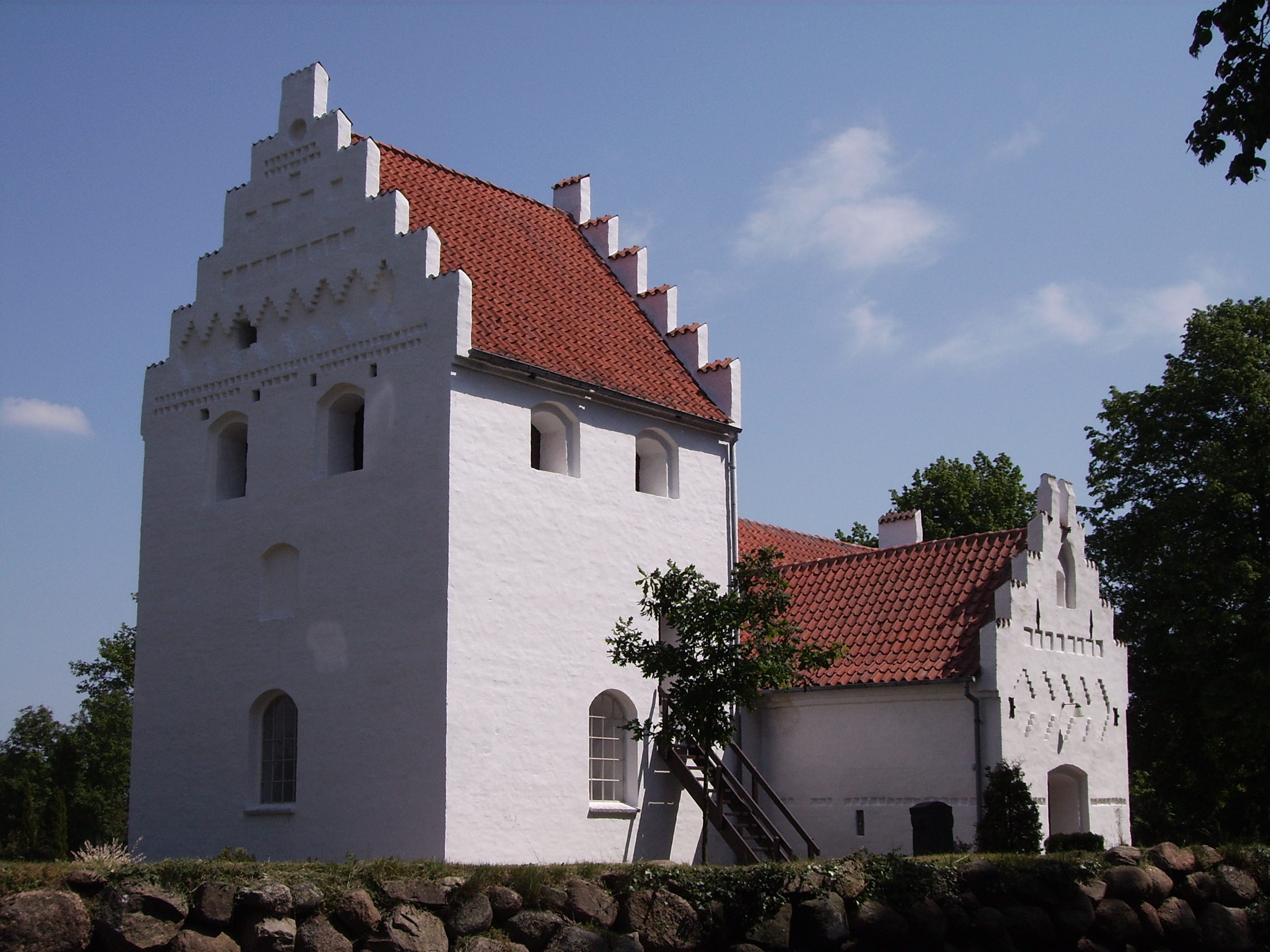 Agedrup Kirke, Agedrup Sogn, Bjerge Herred, Odense Amt, Denmark (Danish Church) - Agedrup Kirkes fra sydvest